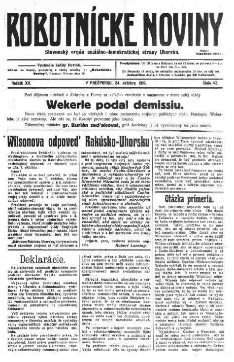 Titulný list periodika Robotnícke noviny, ktoré vychádzalo na Slovensku od začiatku 20. storočia až do r. 1938